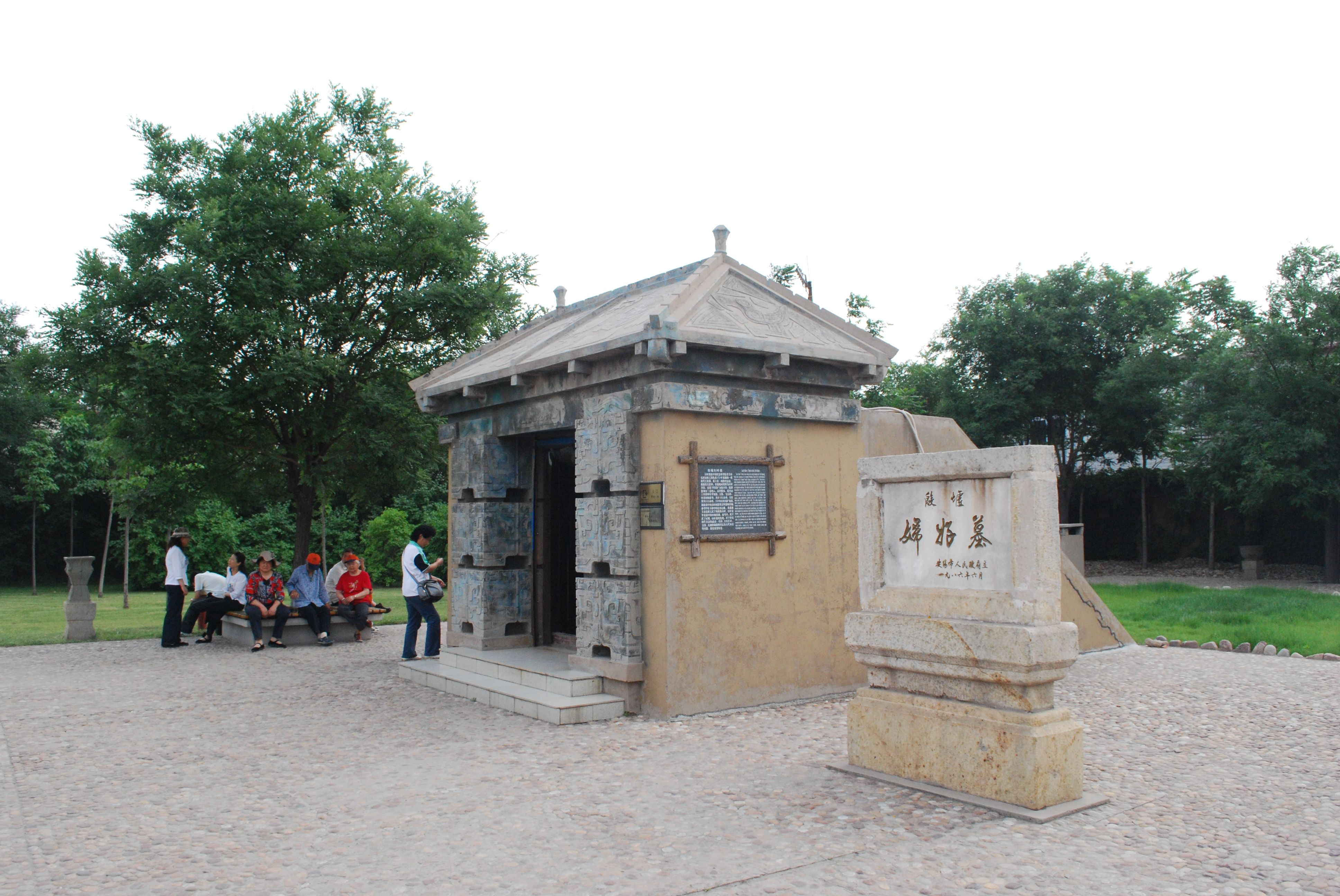 妇好墓